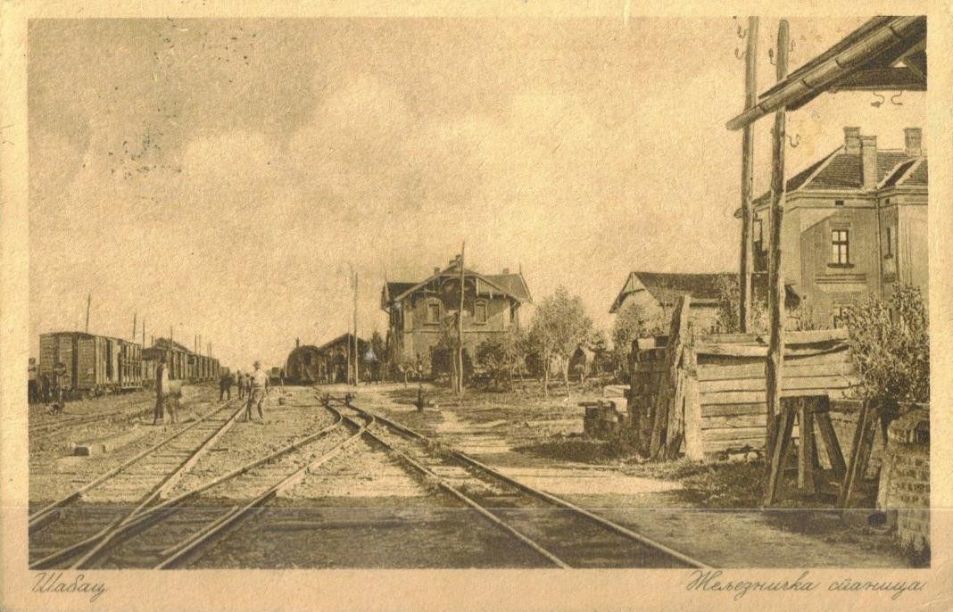 Želenička stanica, Šabac